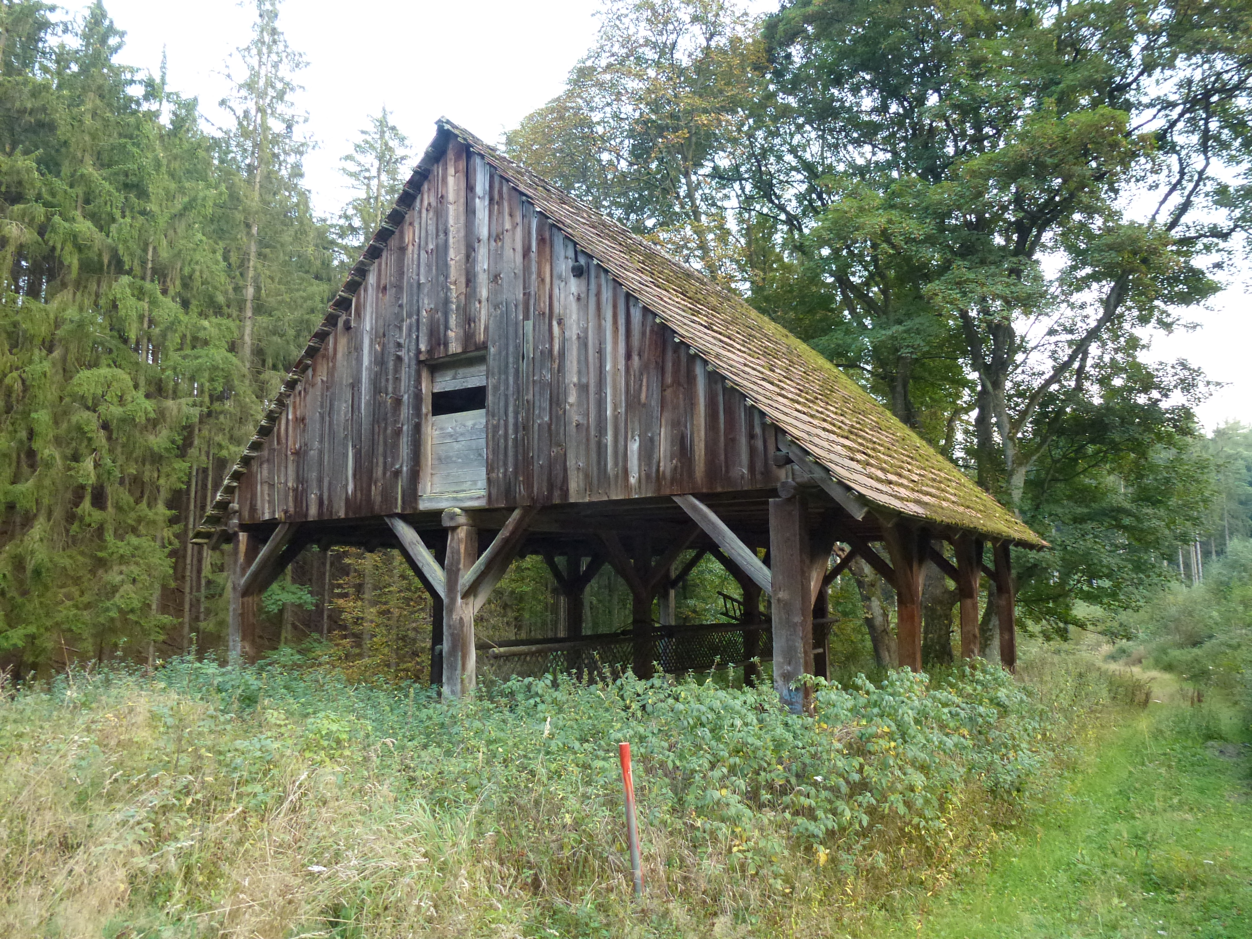 Gräfliche Wildfütterung im Selketal bei Meisdorf, auf einer Lichtung unterhalb Hohe Warte. 1890 errichtet. Dreireihiger Pfahlbau (12 x 8 Meter) mit zwölf eichenen Pfählen und mit Biberschwänzen gedecktes Spitzdach, zwölf Meter (2 x 6 Meter) lange Raufe. 2006 erneuert.